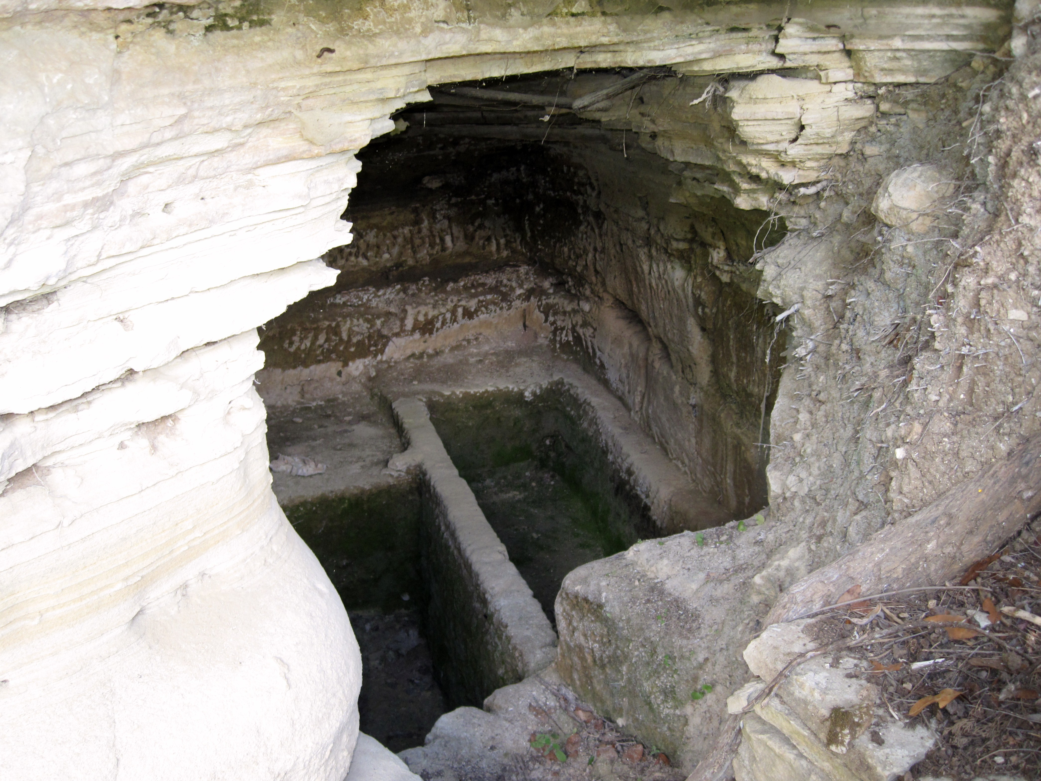 Nekropole der antiken Stadt Lappa bei Argyroupoli, Gemeinde Rethymno, Regionalbezirk Rethymno, Kreta, Griechenland